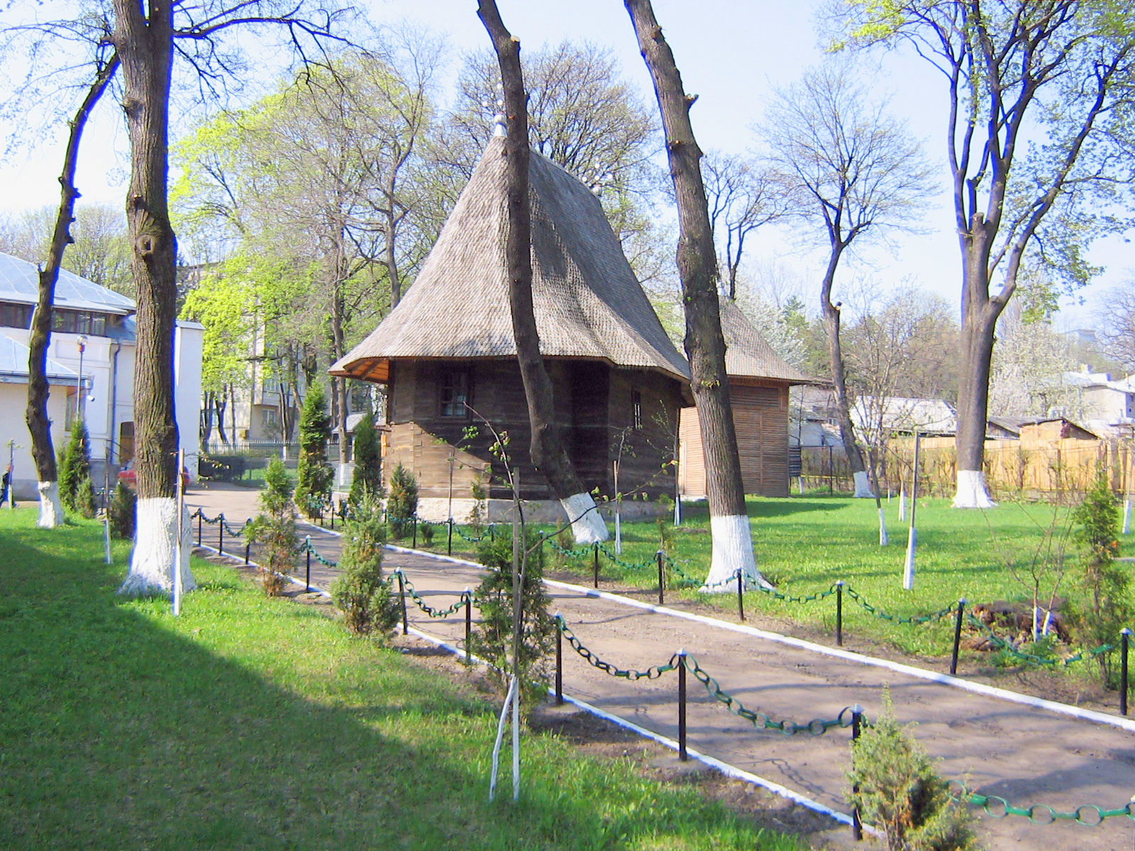 Biserica de lemn din Dorohoi cu hramul "Adormirea Maicii Domnului".